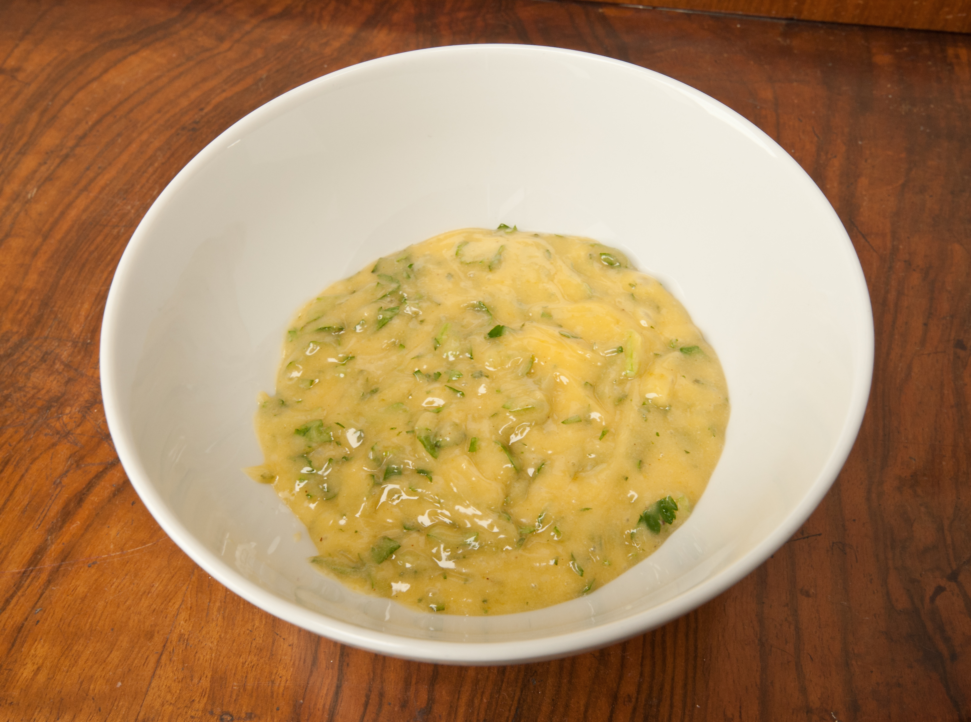 Frisch aufgeschlagene Sauce Béarnaise